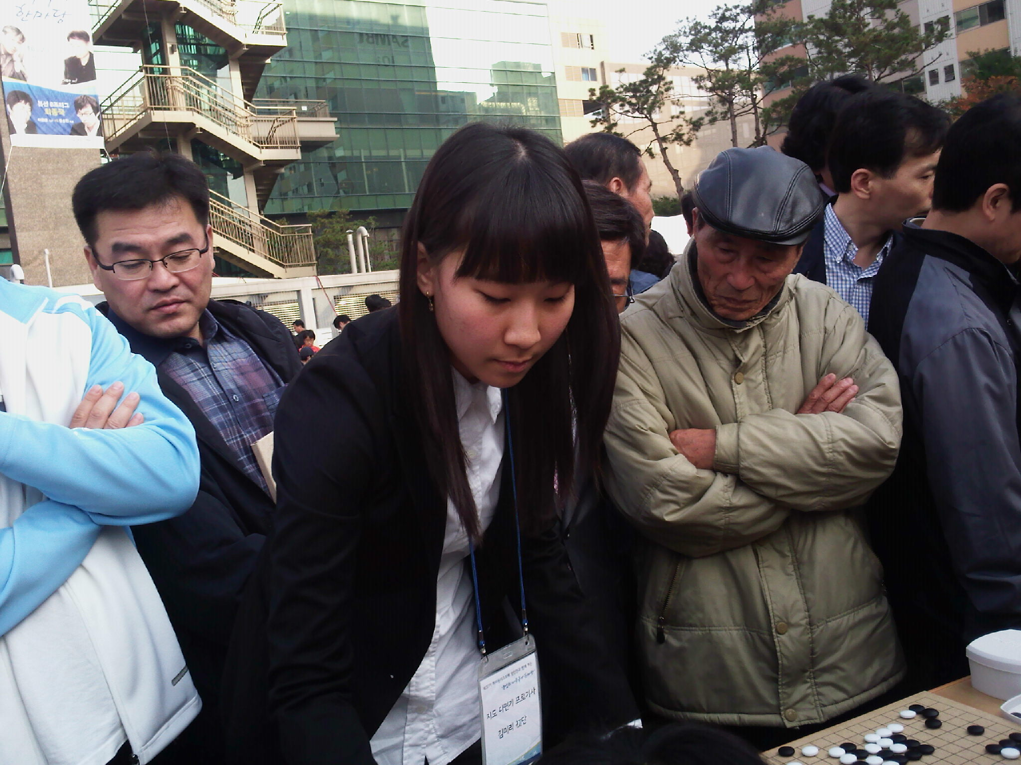 김미리